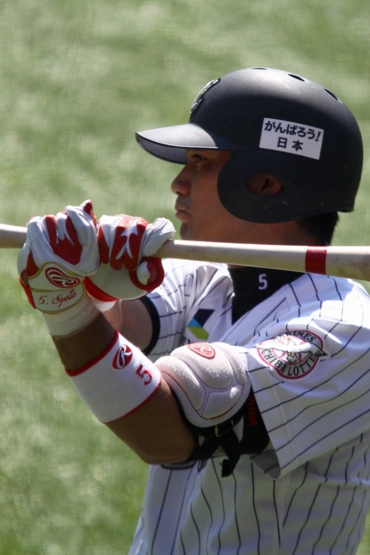 日本プロ野球 千葉ロッテマリーンズ 伊志嶺翔大 外野手